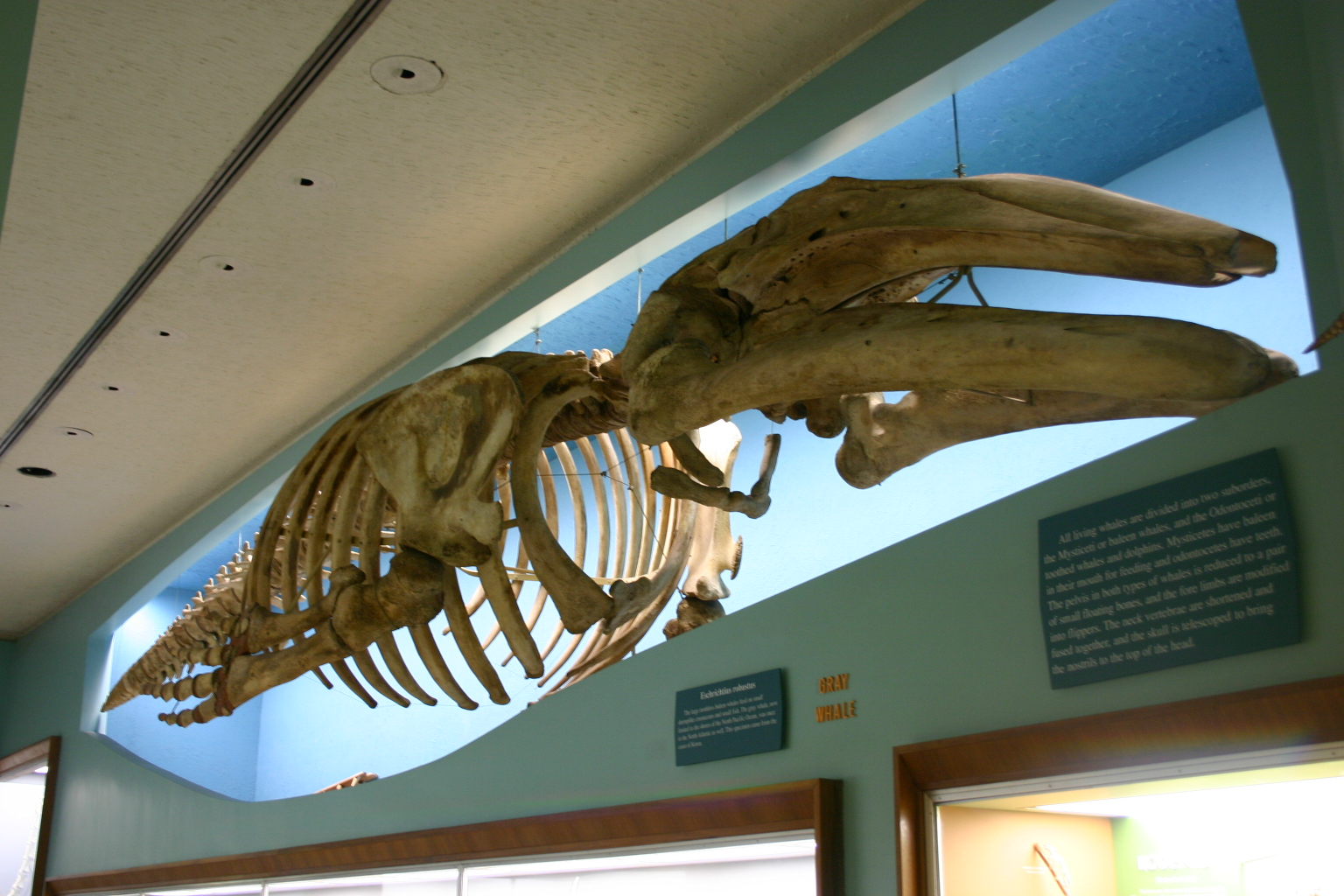 Eschrichtius robustus skeleton